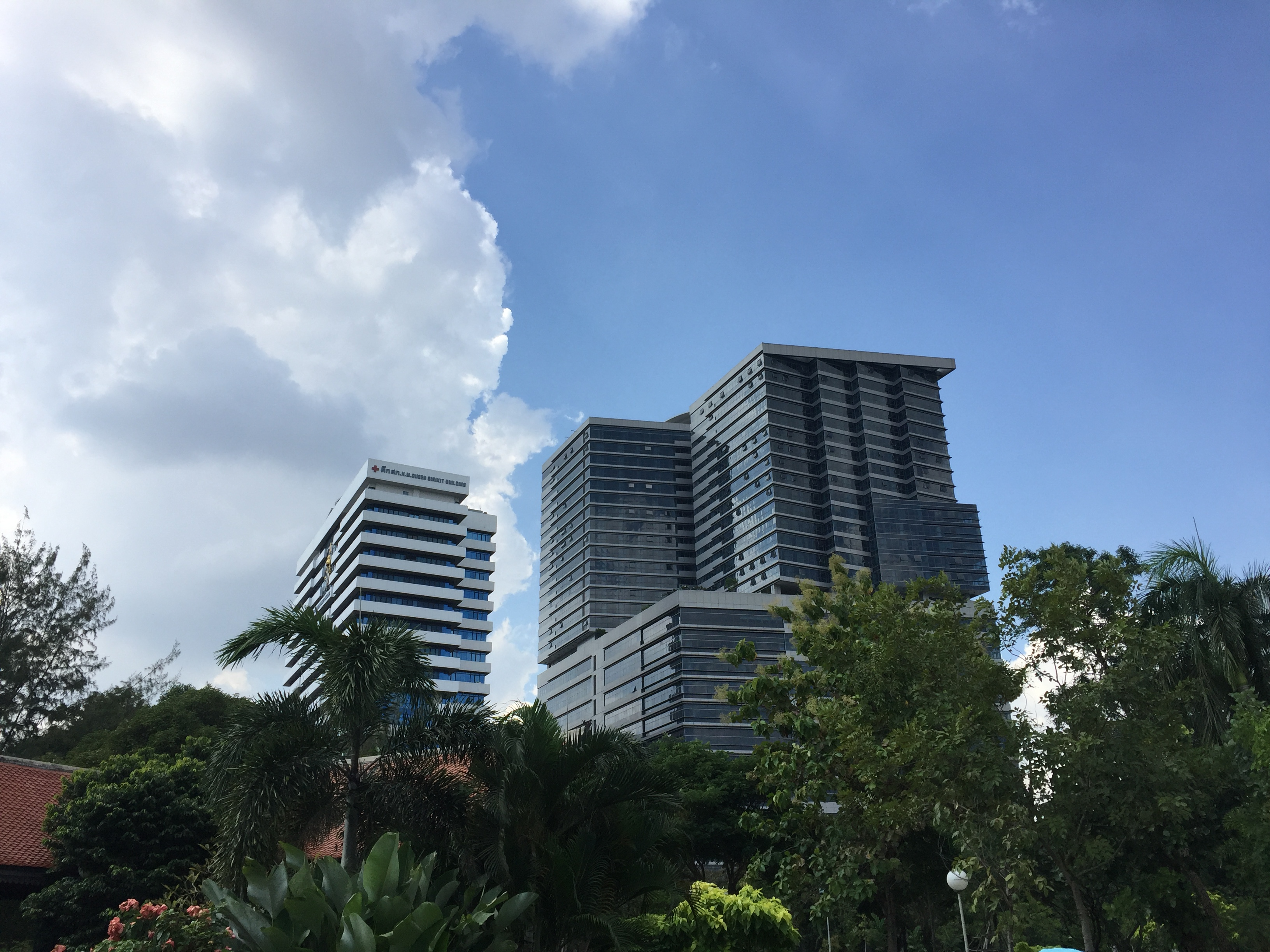 อาคารภูมิสิริมังคลานุสรณ์(ขวา)และอาคาร สก.(ซ้าย)